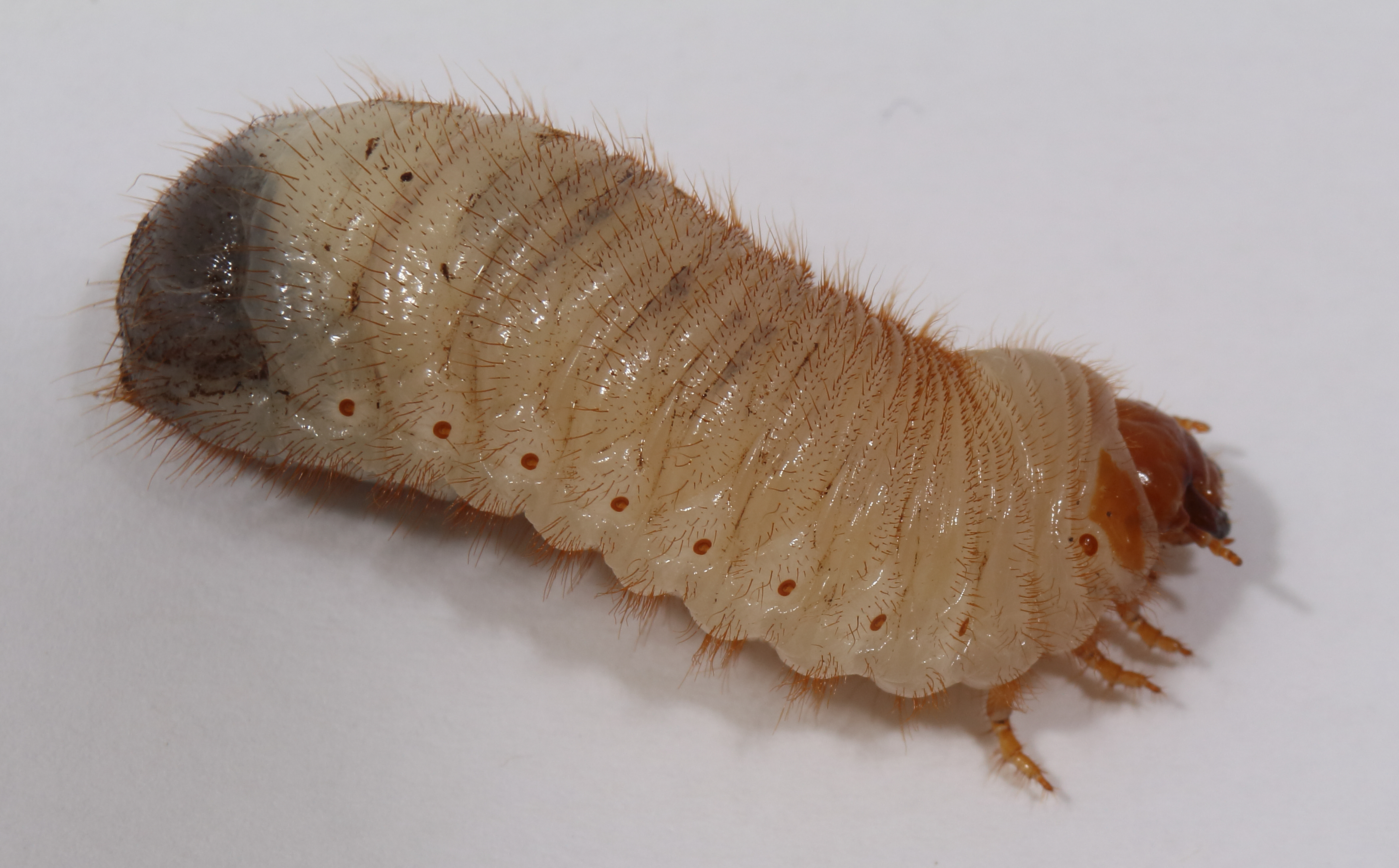 Engerling des Goldglänzenden Rosenkäfers, Cetonia aurata, ca. 32mm. Gefunden im steinernen Blumenkasten beim Umtopfen Die abgebildete Larve wurde am 23. März 2015 von IKAl auf WP:RBIO/B bestimmt, bestätigt von Meloe ebenfalls dort The larva shown here has been identified by IKAl on WP:RBIO/B 2015, March 23rd, confirmed also there by Meloe